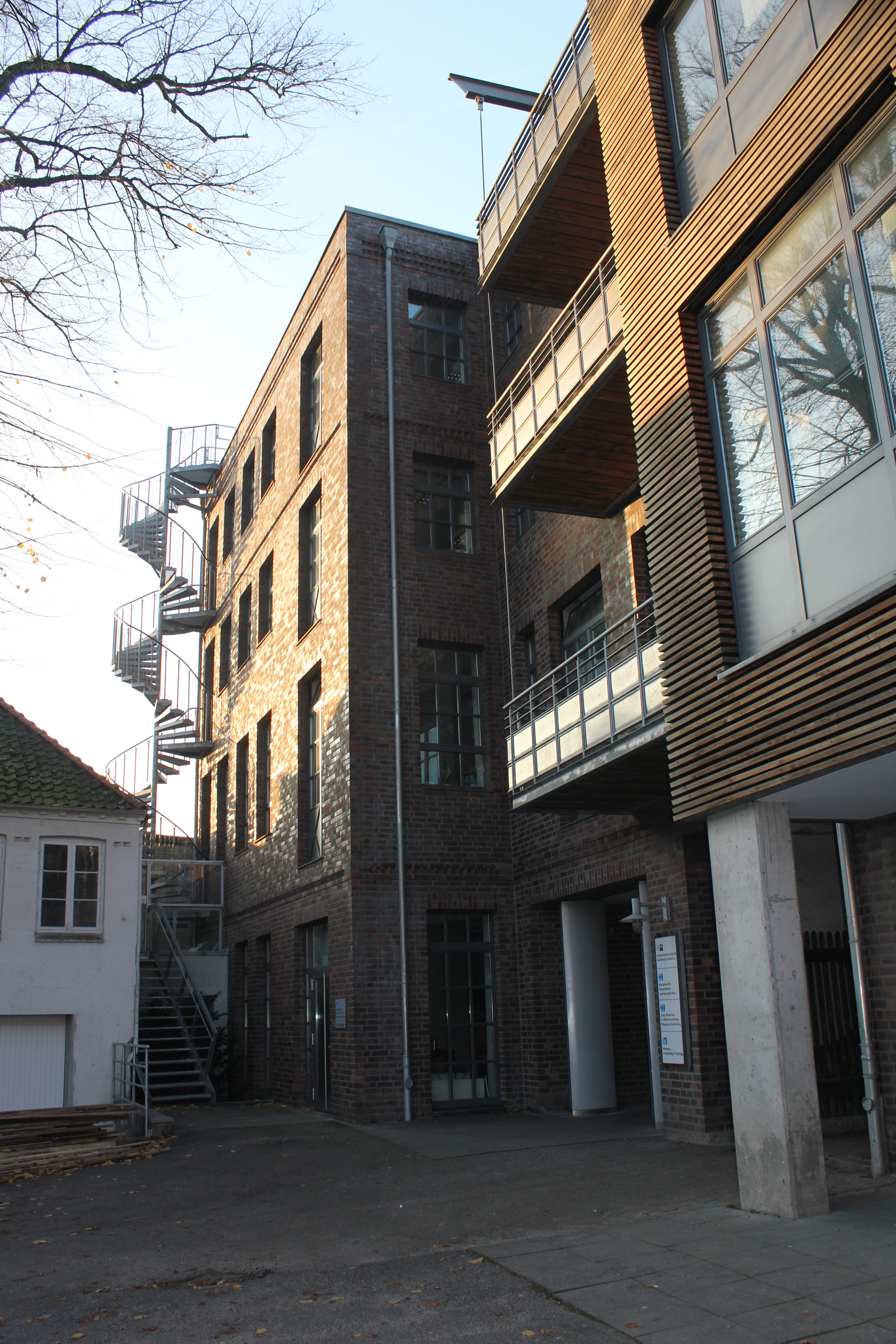 Wirtschaftsakademie Flensburg (Vorderansicht) -- Eingang -- Einer der drei tragenden IHK- Standorte (Flensburg, Kiel und Lübeck)